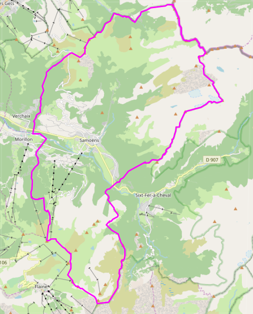 carte réalisée sur umap This map may be incomplete, and may contain errors. Don't rely solely on it for navigation.